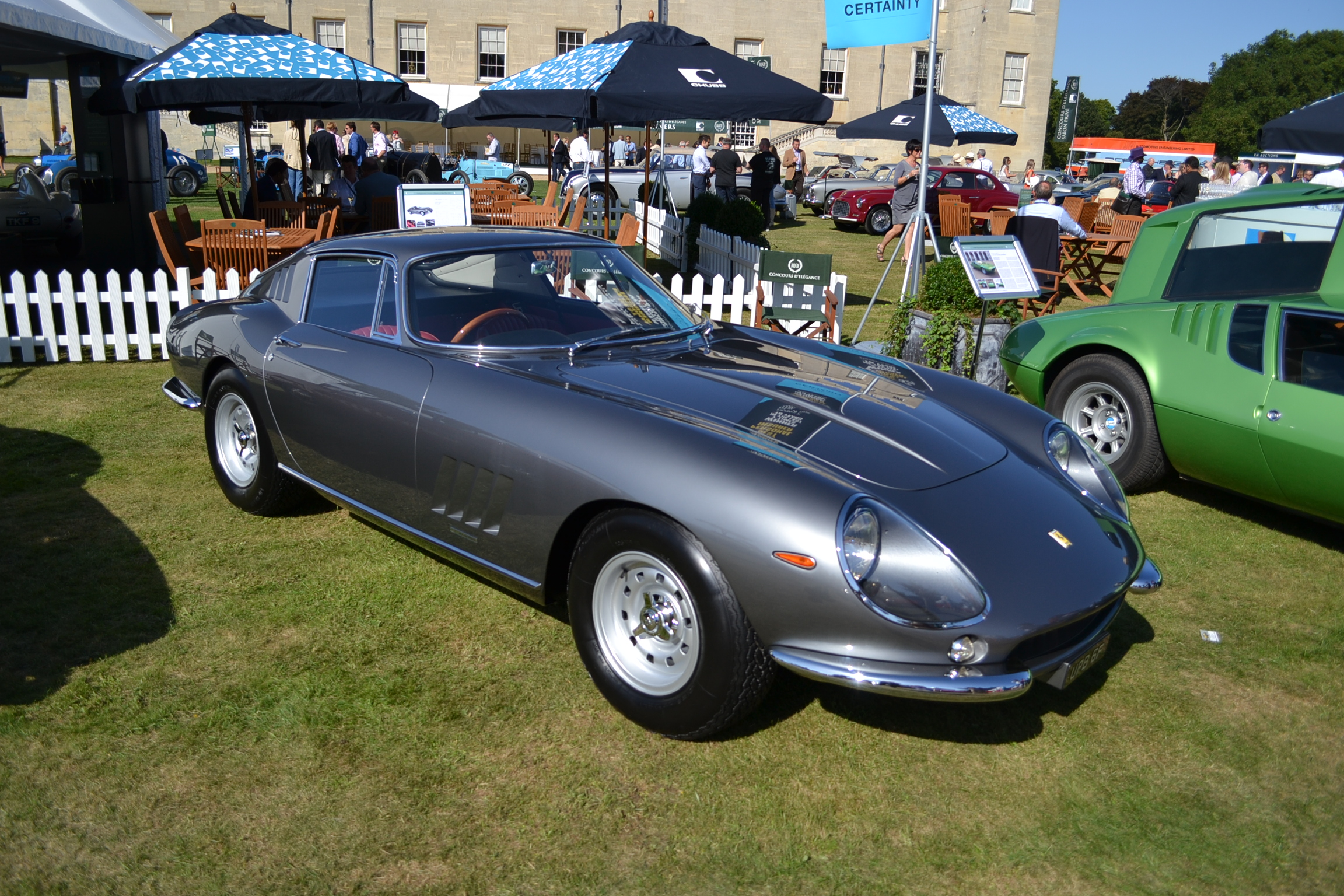 Salon Privé London 2012